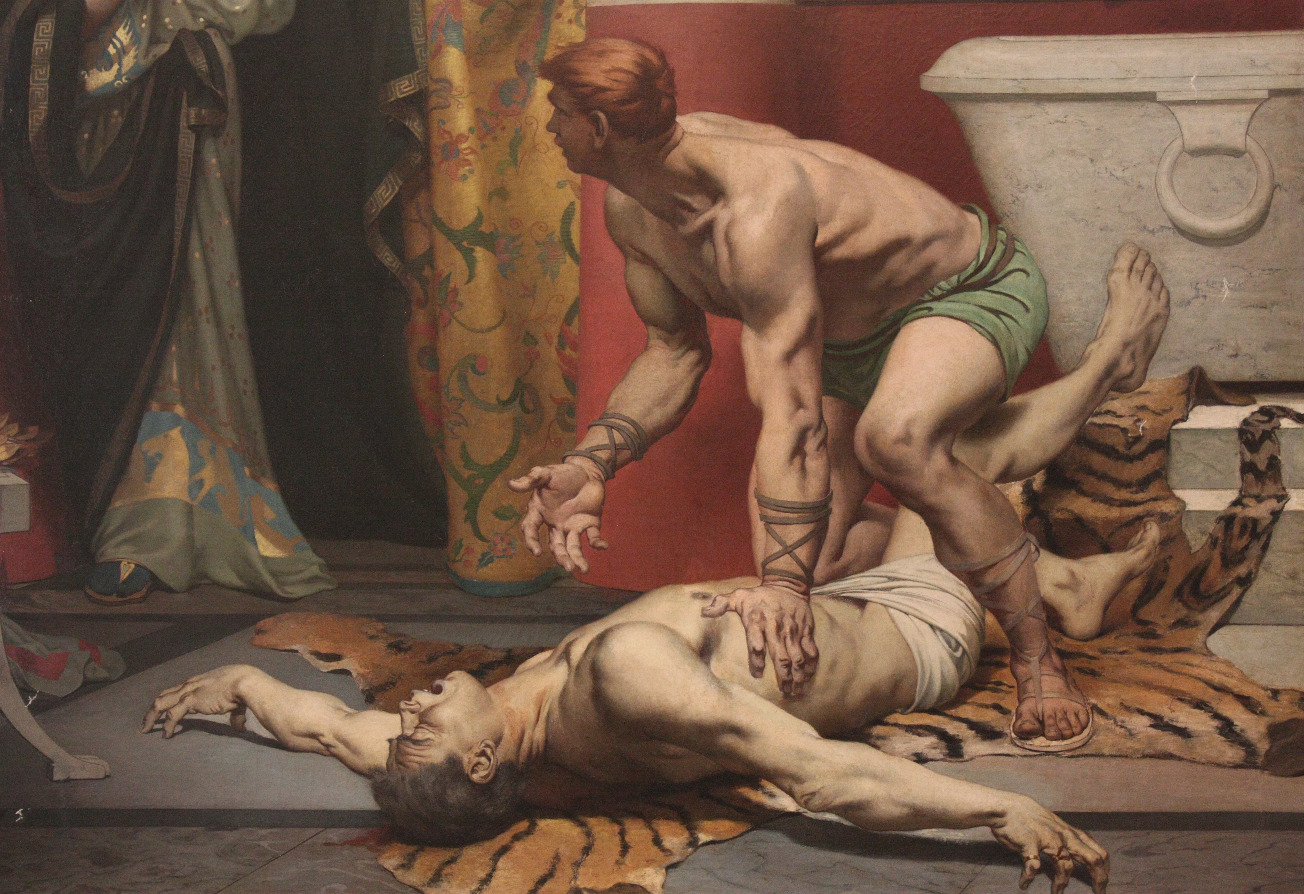 Détail de "La Mort de Commode" par Fernand Pelez, 1879. Assassinat de l'empereur Commode, commandité par sa maîtresse Marcia.